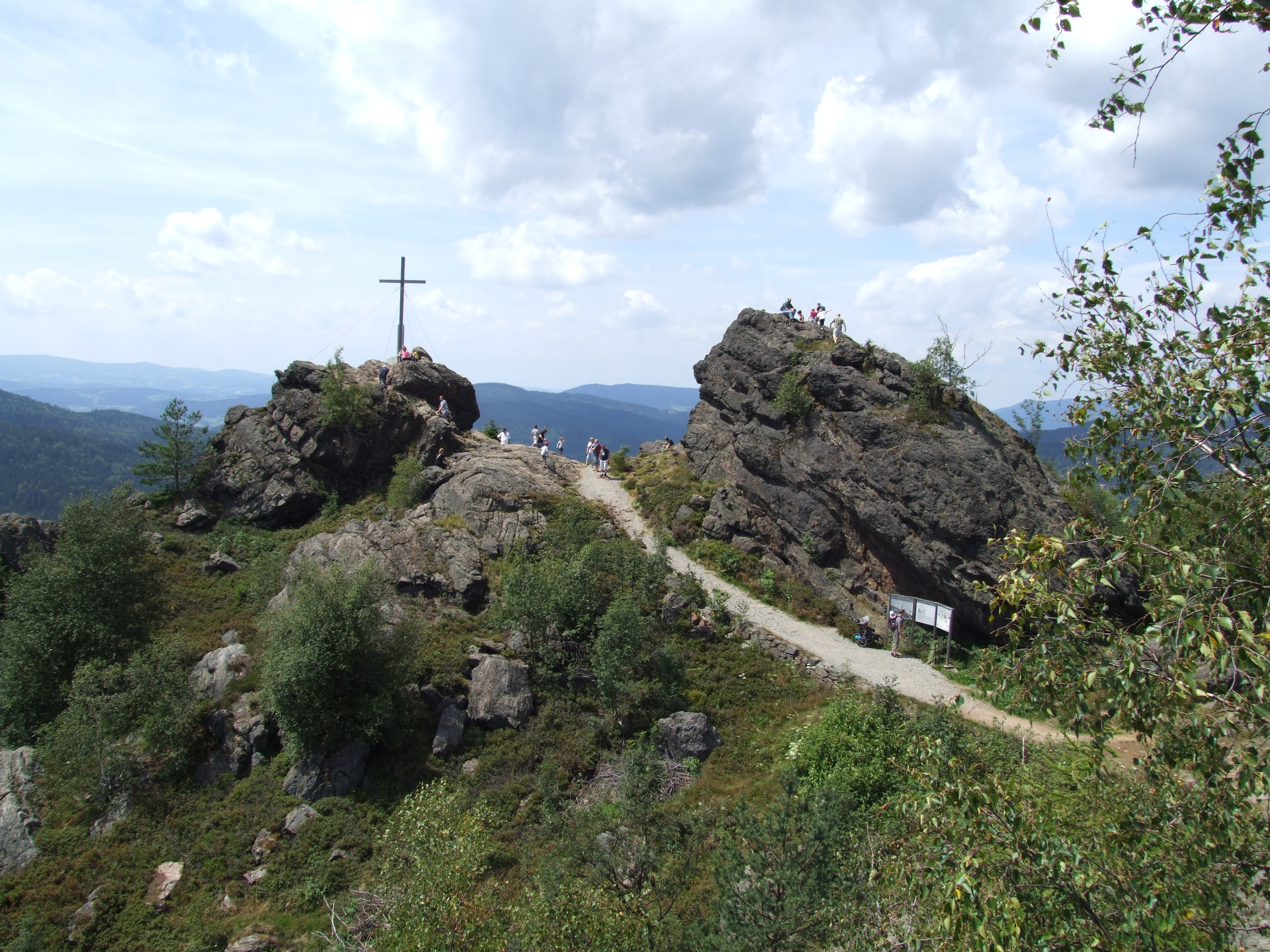 Silberberg, Gipfel von Osten aus gesehen; Bodenmais, Bayrischer Wald